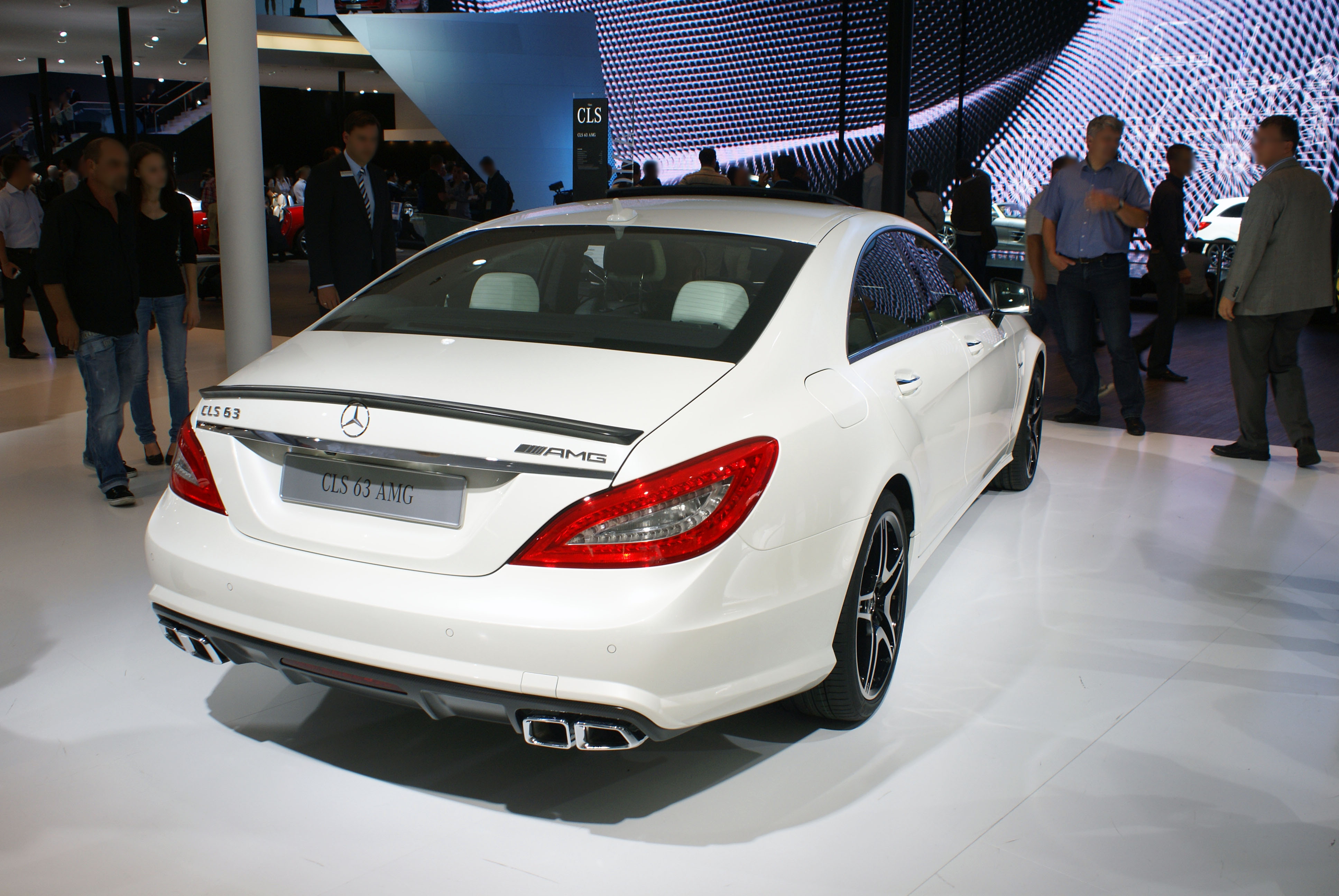 Mercedes-Benz CLS 63 AMG (C219)